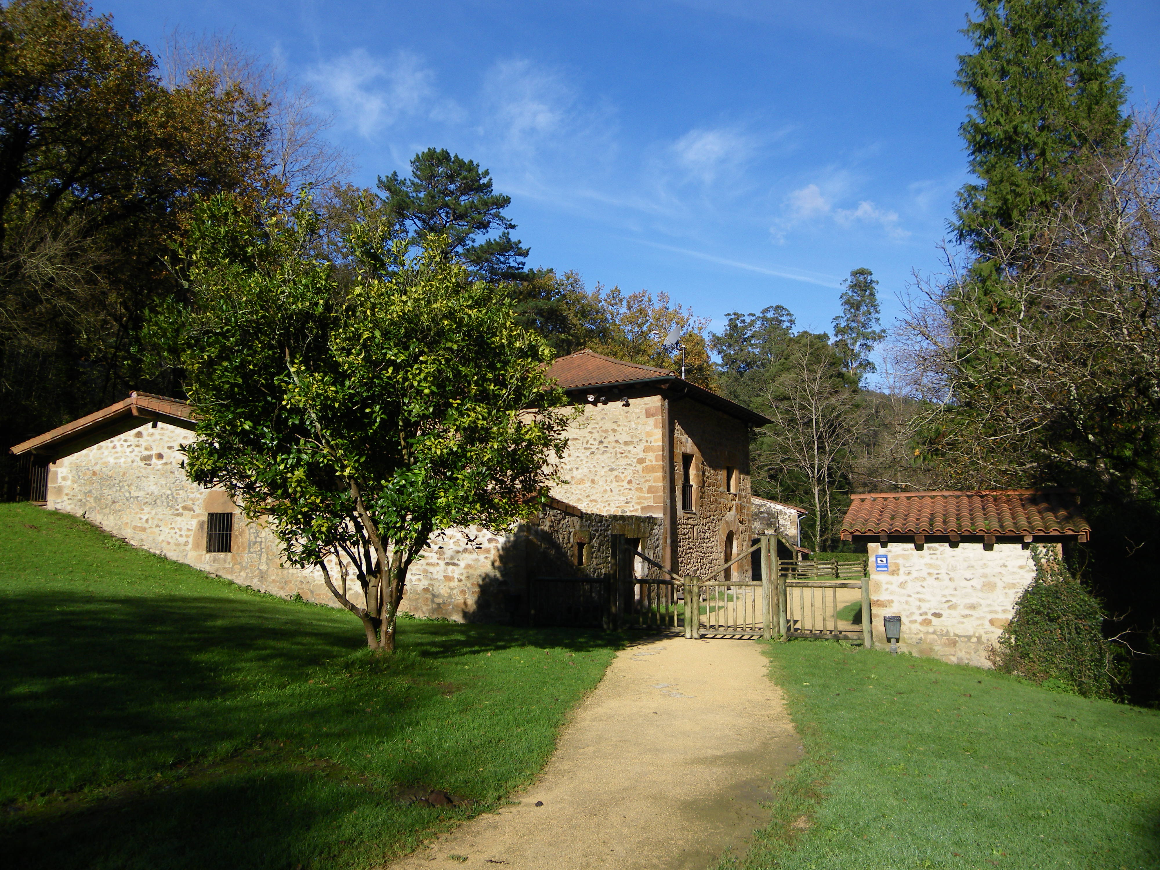 El Pobaleko burdinola, museo moduan berrireki zuten 2004. urtean. Bertan, honako hauexek daude ikusgai: errota, gaur egun erakusketa-etxea den jauregi-etxea, tailerra, bi labe, ukuiluak, urtegia eta XVII. mendeko zubia. Pobal (Olaundia edo Olazaharra), Muskiz, Enkarterri, Bizkaia.